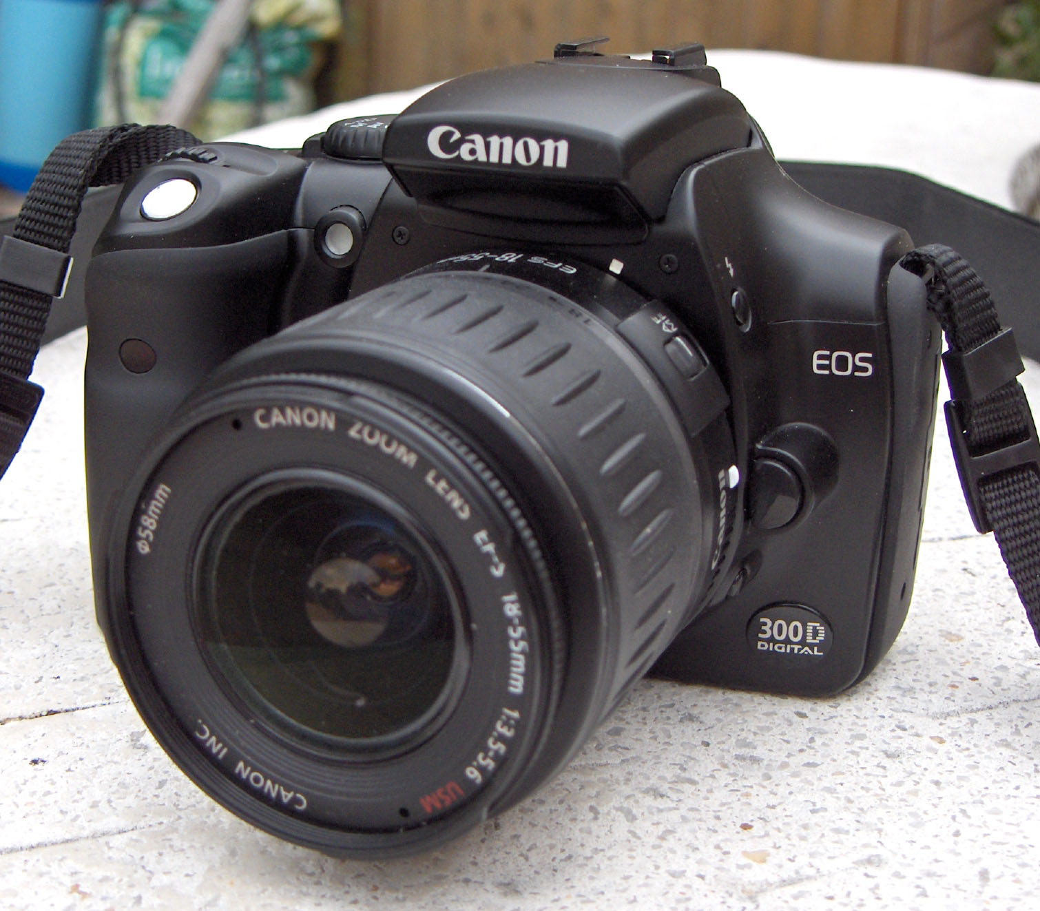 ©éréales Kille® ☺ 25 juillet 2005 à 17:17 (CEST)